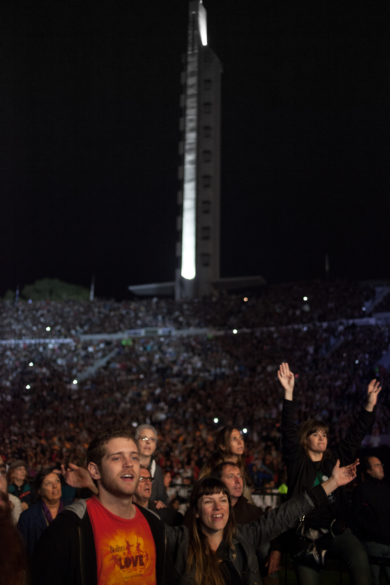 "18.000 Personas vieron el show en la cancha, un récord para este tipo de espectáculos. Había unas 55.000 en todo el estadio." Ref: Beatles Love & Torre de los homenajes. Estadio Centenario, Barrio Batlle, Montevideo, Uruguay. Camera: Canon EOS 5D Mark II Lens: Voigtlander Ultron 40mm F/2 SL-II Aspherical Compact Pancake 0 ISO: 2000 Published